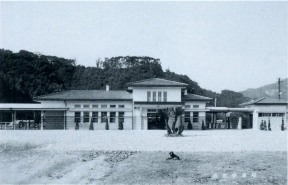 油津停車場(日南線油津駅)。「内海線大堂津油津間開通記念絵葉書」(1937年4月、鉄道省熊本建設事務所)より。